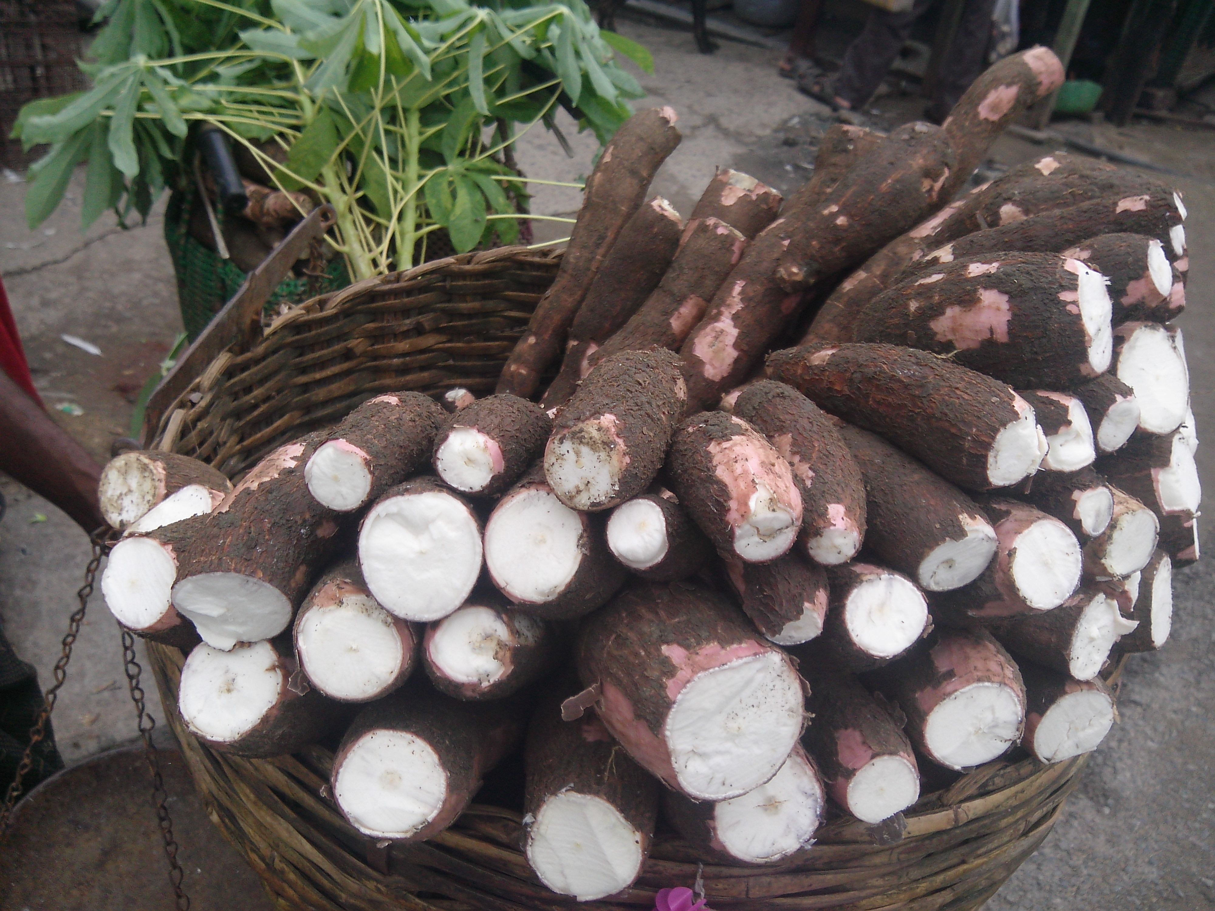 மரவள்ளிக்கிழங்கு, சேலம், தமிழ் நாடு.